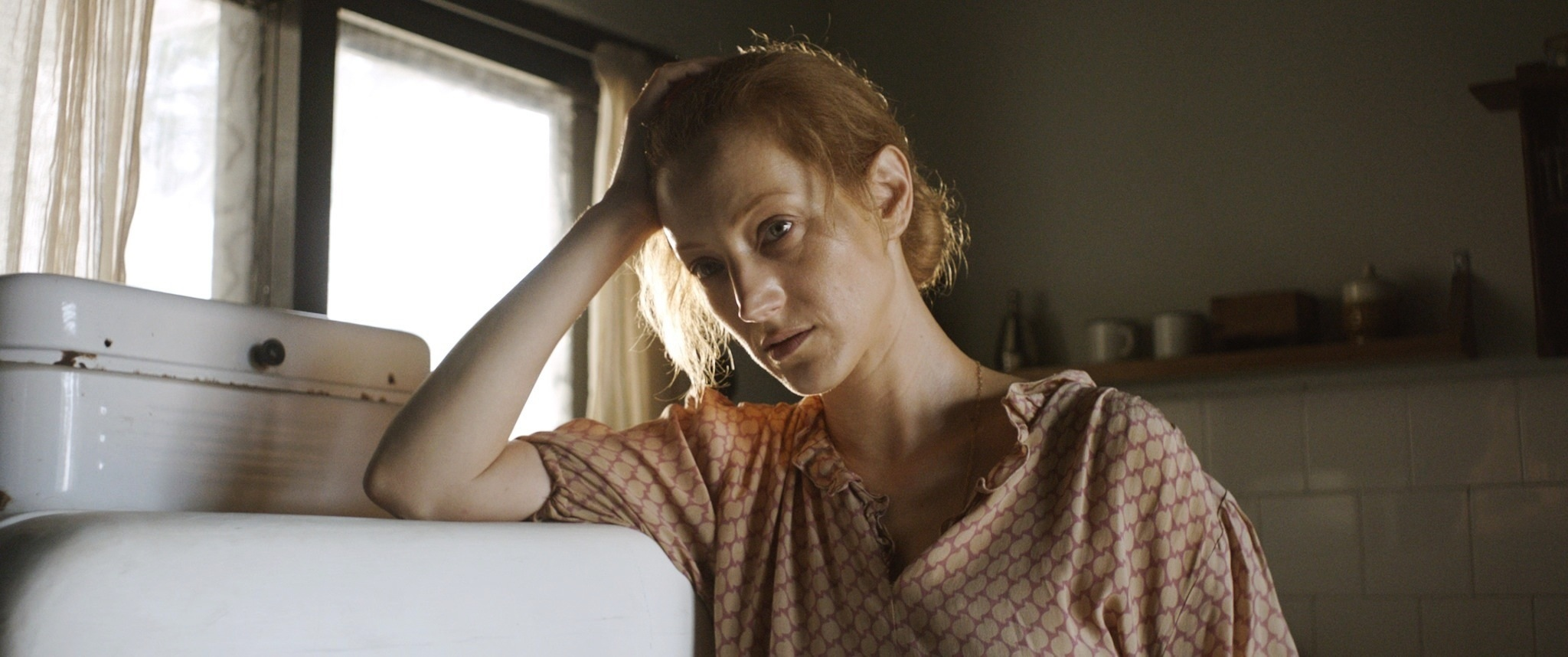 הילה וידור בסרט לוויה בצהריים צילום נדב הקסלמן 2012